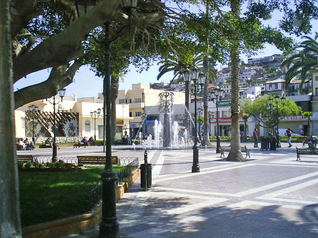 Plaza de Coquimbo, foto de autoria propia, tomada en septiembre del 2005.